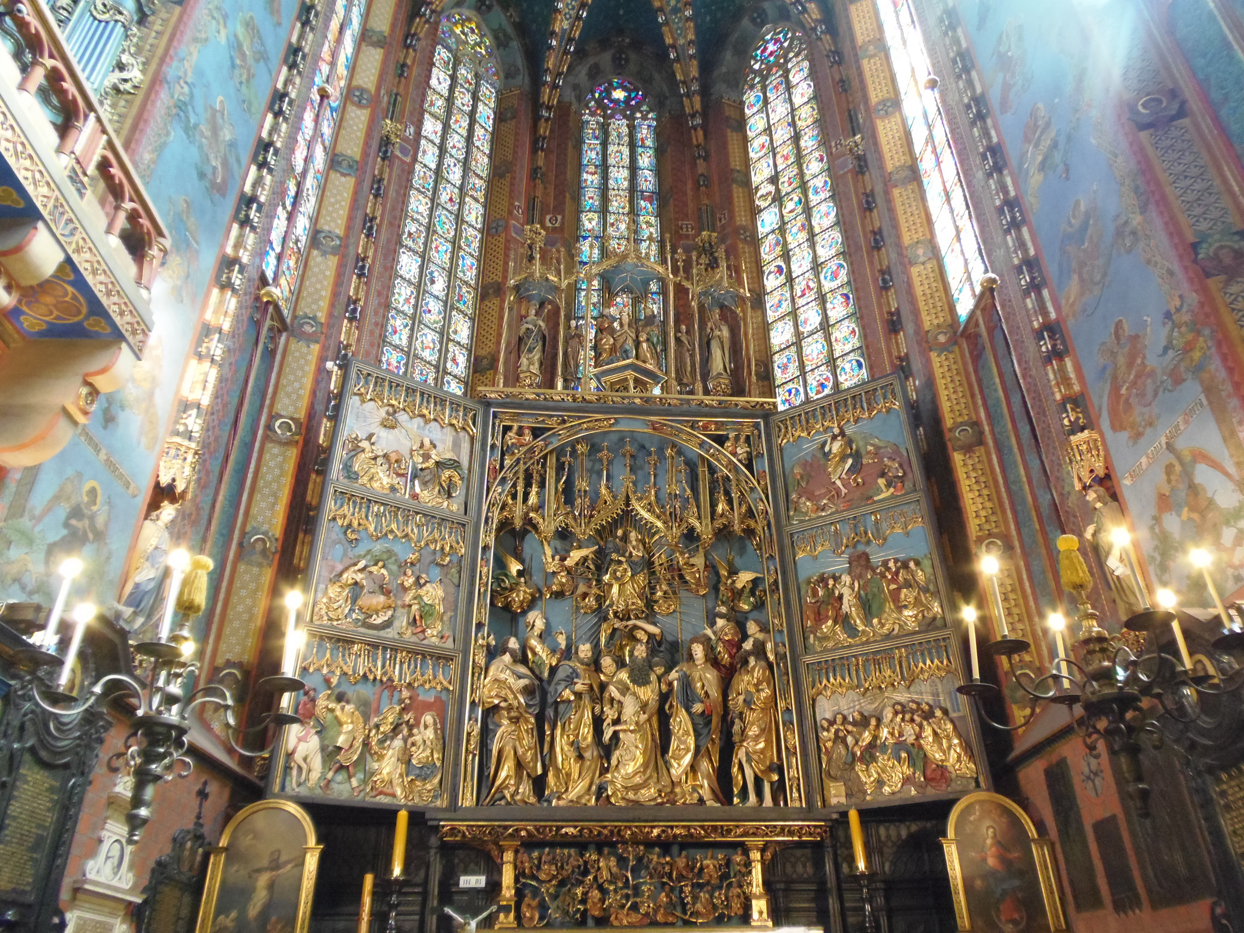 ołtarz Wita Stwosza English | polski | +/−